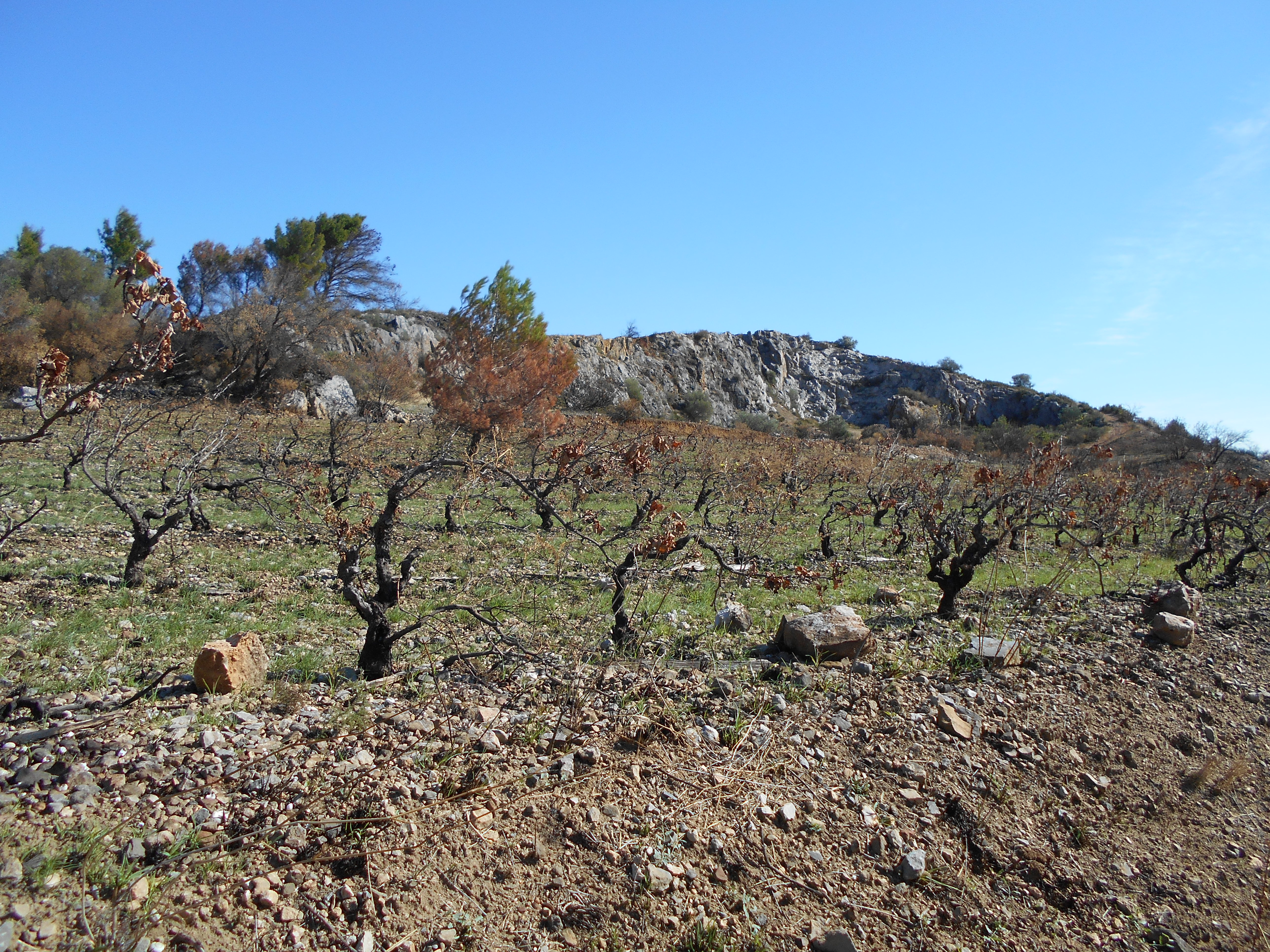 Baixàs:detall de la Serra de Pena.